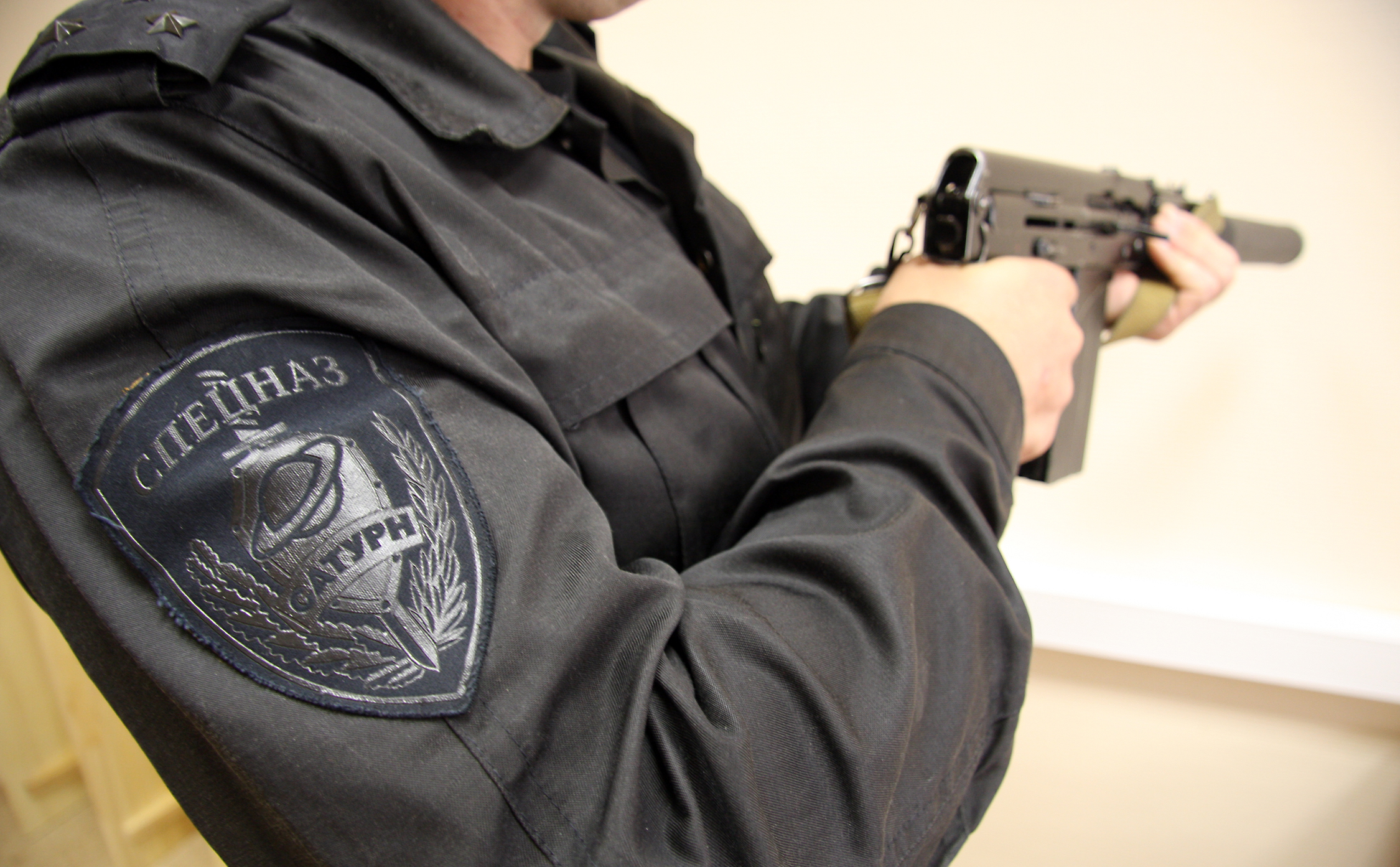 Сотрудник отдела демонстрирует автомат 9А-91